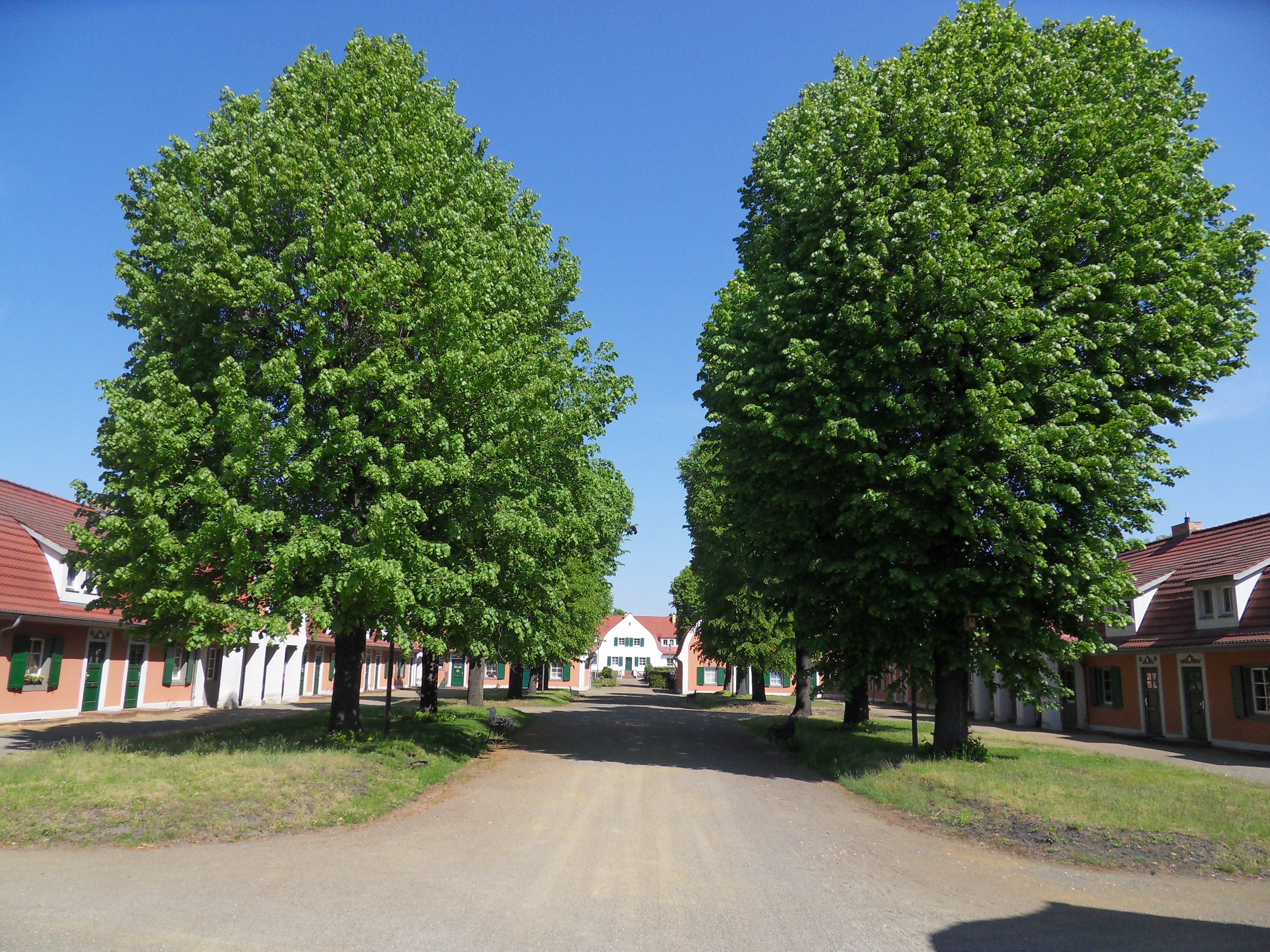 Denkmalgeschützter Grundhof in Lauchhammer-Mitte